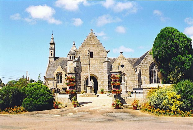 Plouilio. Keraodi. 2